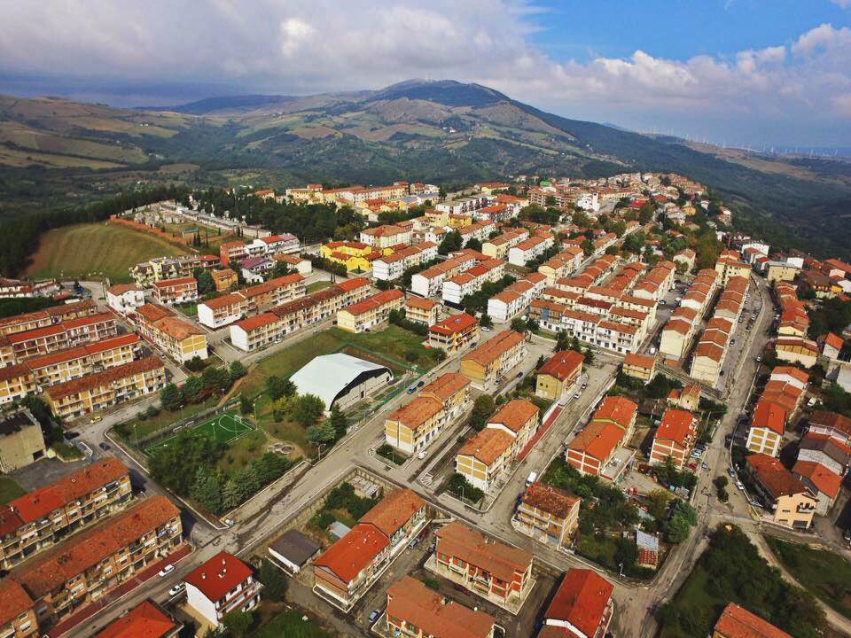 Panorama di Accadia (FG)